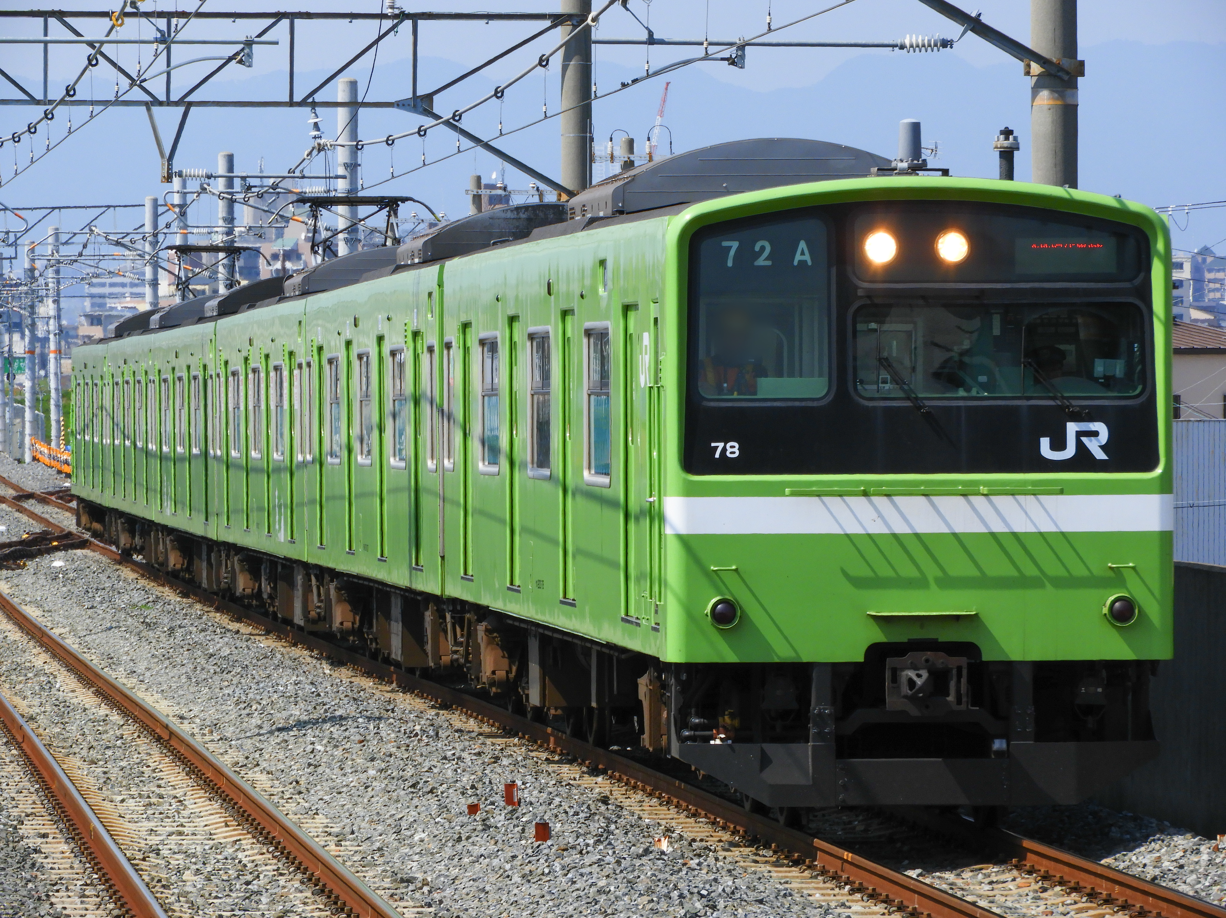 おおさか東線普通久宝寺行き 201系ND606編成(吹田総合車両所奈良支所所属) 城北公園通駅にて Nikon Coolpix B700